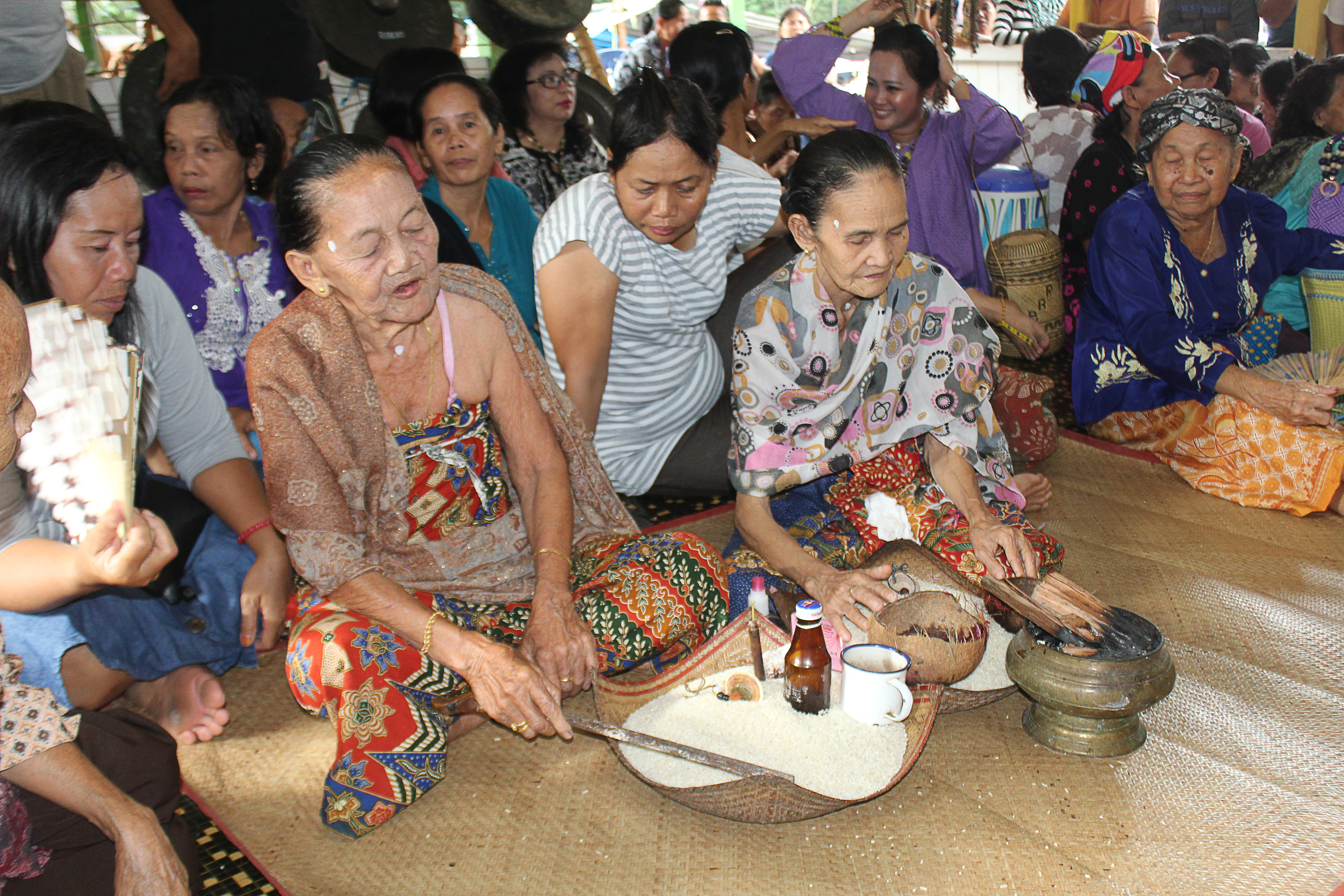 Wadian adalah pemimpin ritual dalam kebudayaan Dayak Maanyan dan biasanya perempuan. Wadian memegang peranan sangat penting dalam setiap ritual.